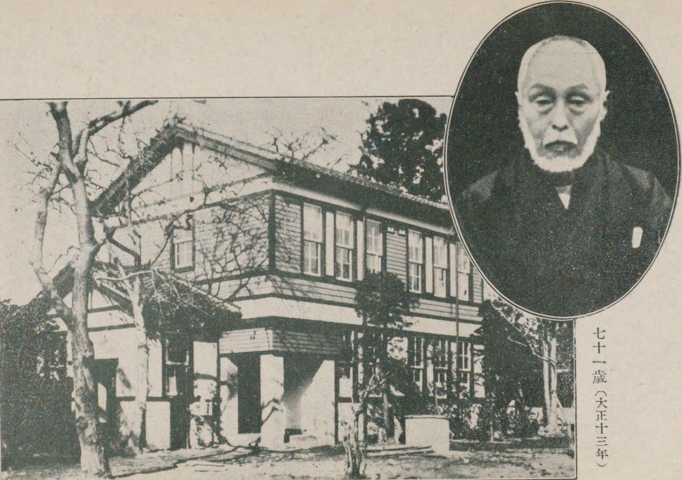 右上：斎藤善右衛門 71歳（大正13年） 左下：財団法人斎藤報恩会仮事務所（大正15年写） 学術研究総務部・産業及社会総務部